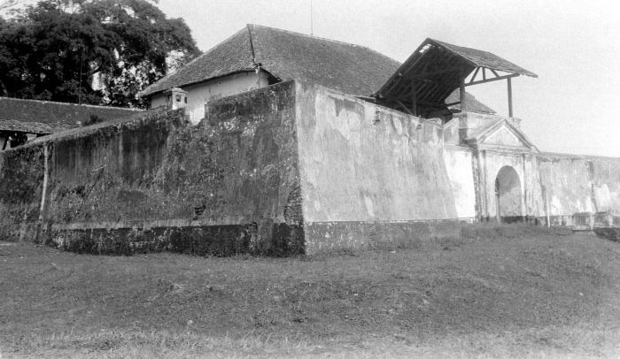 Negatief. Fort "De Ontmoeting" in Oengaran bij Semarang, Midden-Java